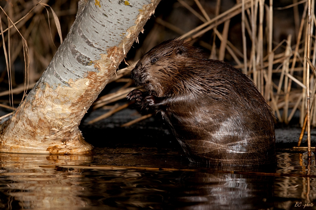 Castor fiber, Jakubov, Slovakia